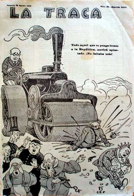 Portada de "La Traca" de 1932, amb Manuel Azaña atropellant als seus enemics. Autor anònim.